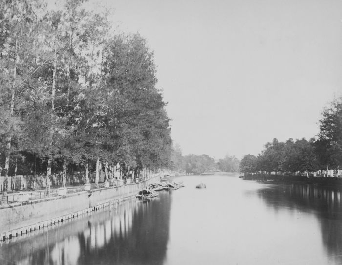 foto. Gezicht over de Kali Mas bij de wijk Genteng in Soerabaja